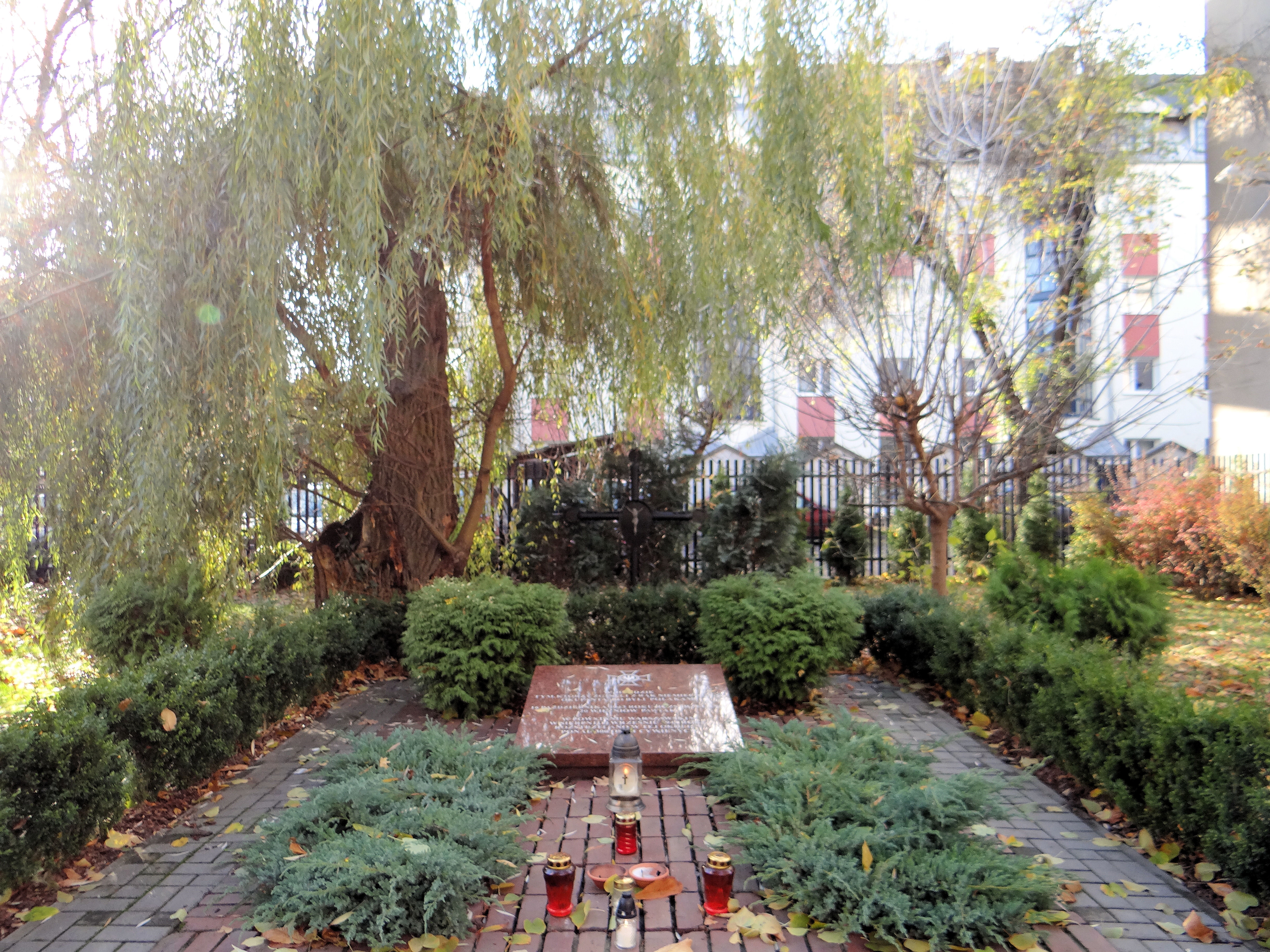 Miejsce Pamięci Narodowej na terenie podwórza posesji przy al Niepodległości 141: 16 października 1943 r niemieccy oprawcy rozstrzeli tutaj 20-tu weięźniów Pawiaka' w Powstaniu Warszawskim w sierpniu i wrześniu 1944 w tej okolicy niemieccy zbrodniarze rozstrzelali ponad 300 osób